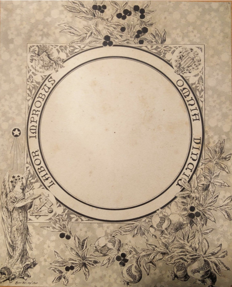 Dibujo de Aureo Bis que demuestra su formación clásica.